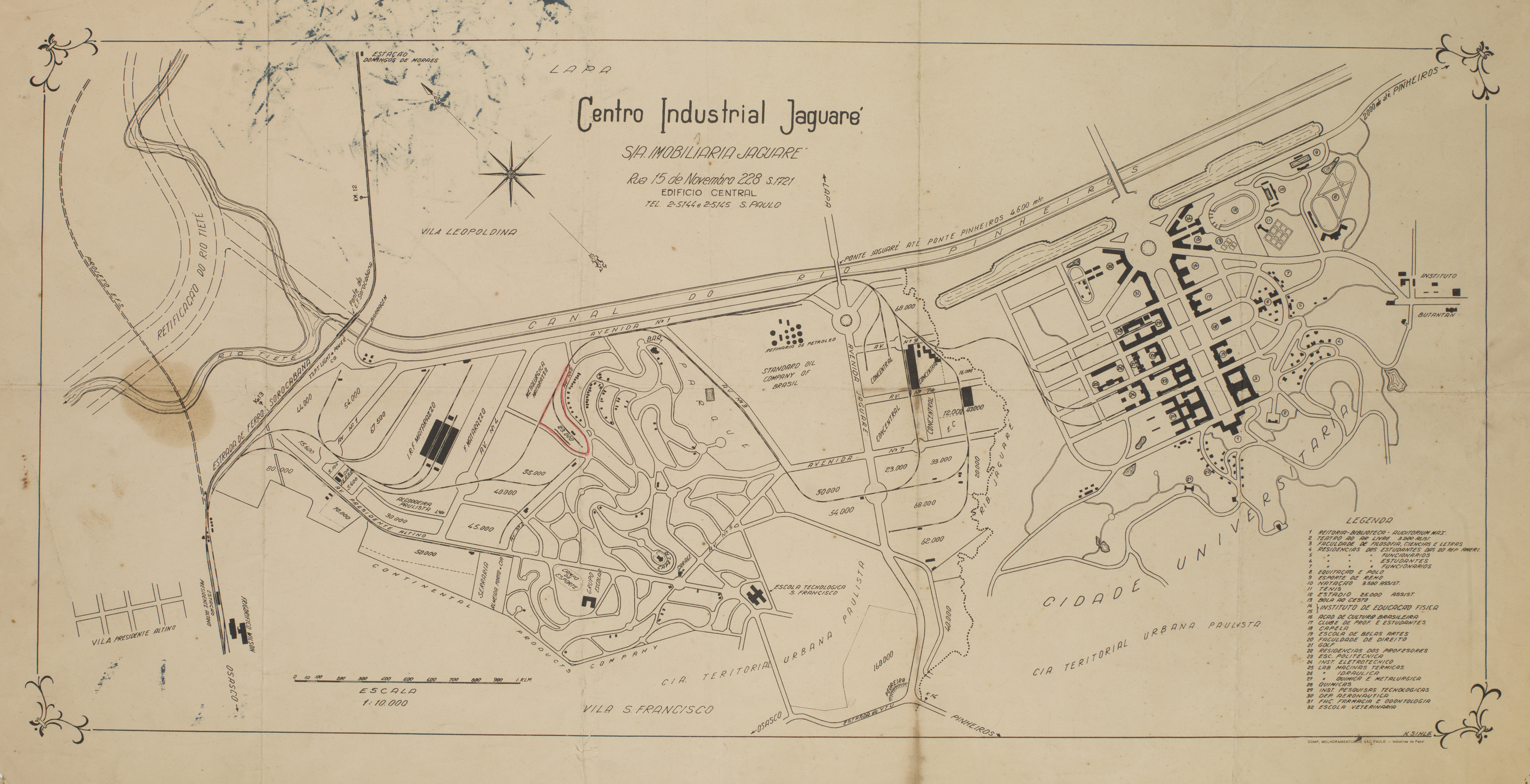 Obra que integra o acervo do Museu Paulista da USP. Coleção João Baptista de Campos Aguirra - Ref. Agente: S/A Imobiliaria Jaguaré - Companhia Melhoramentos de São Paulo - Indústria de Papel